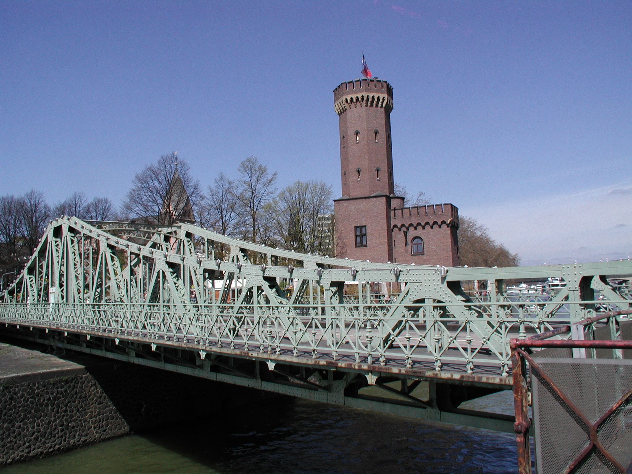 Köln,Drehbrücke, links